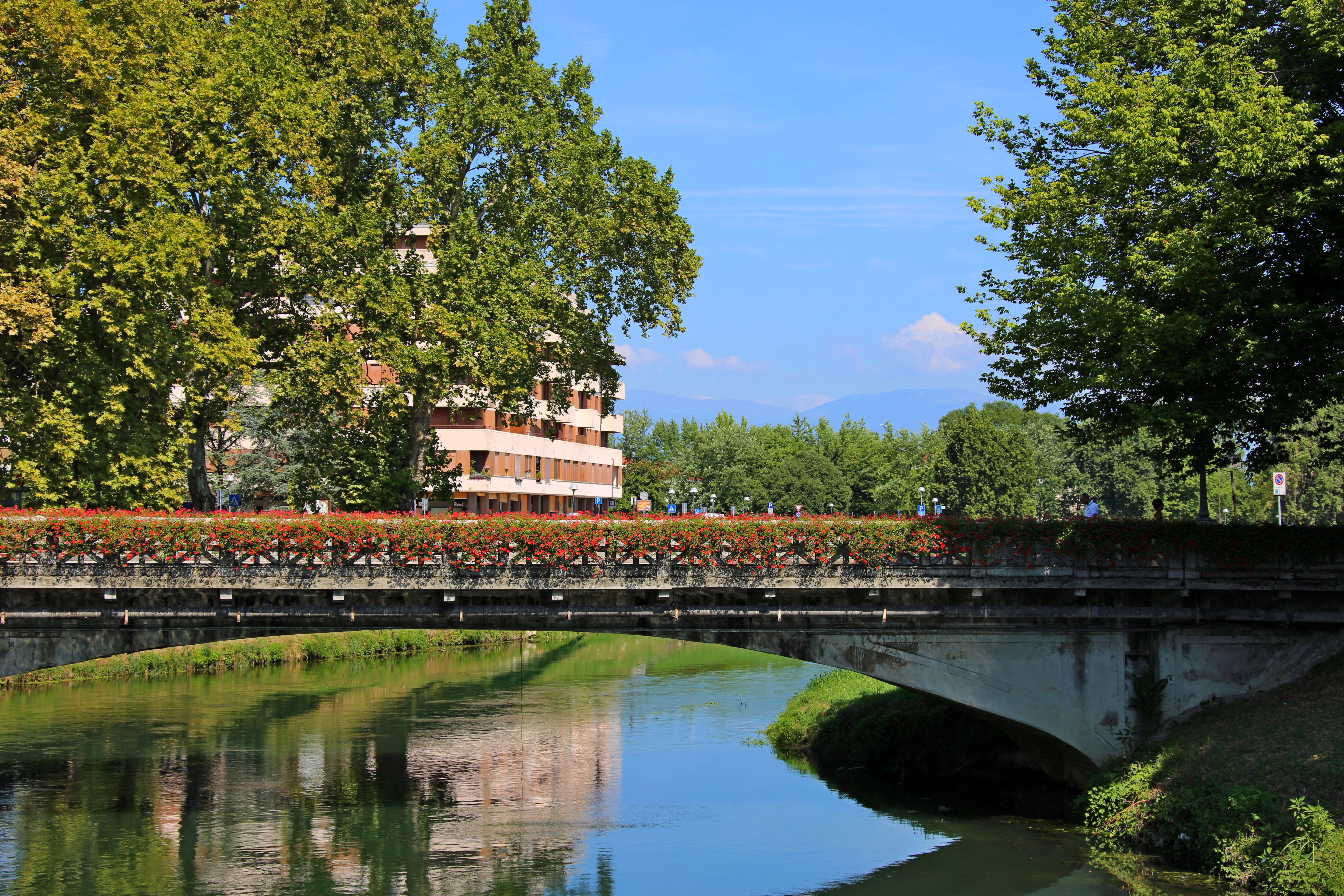 Ponte sul Monticano This is a photo of a monument which is part of cultural heritage of Italy.